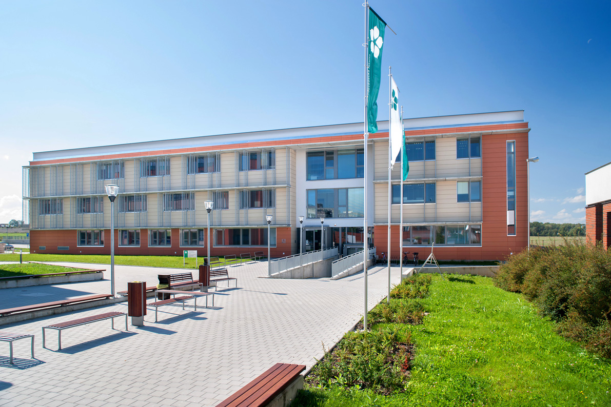 Budova C Přírodovědecké fakulty JU - sídlo děkanátu a několika ústavů a kateder